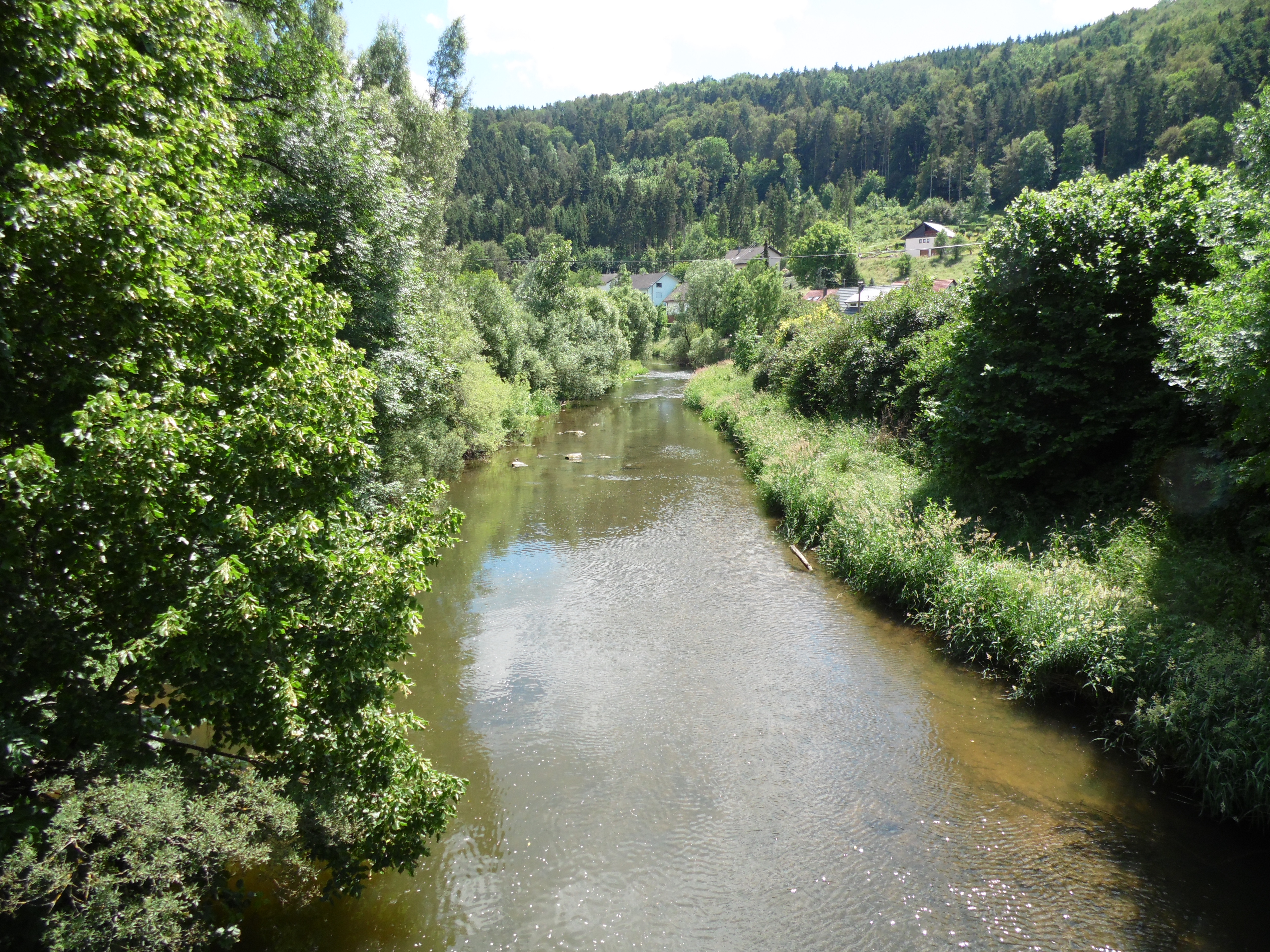 Fluss Glatt bei Glatt